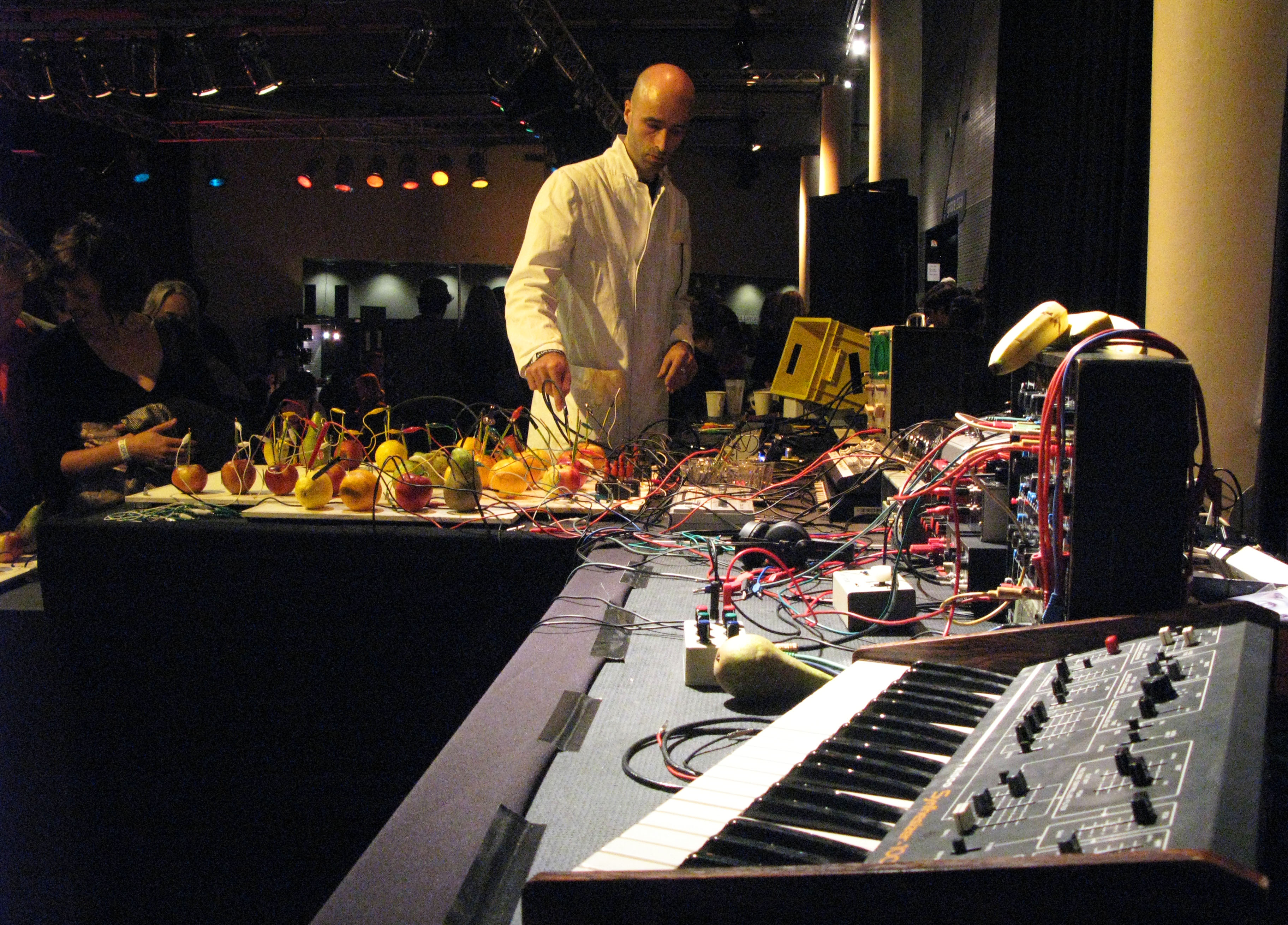 todaysart08-40